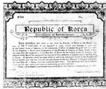 임정구미위원부 발행 50달러권 대한독립공채표